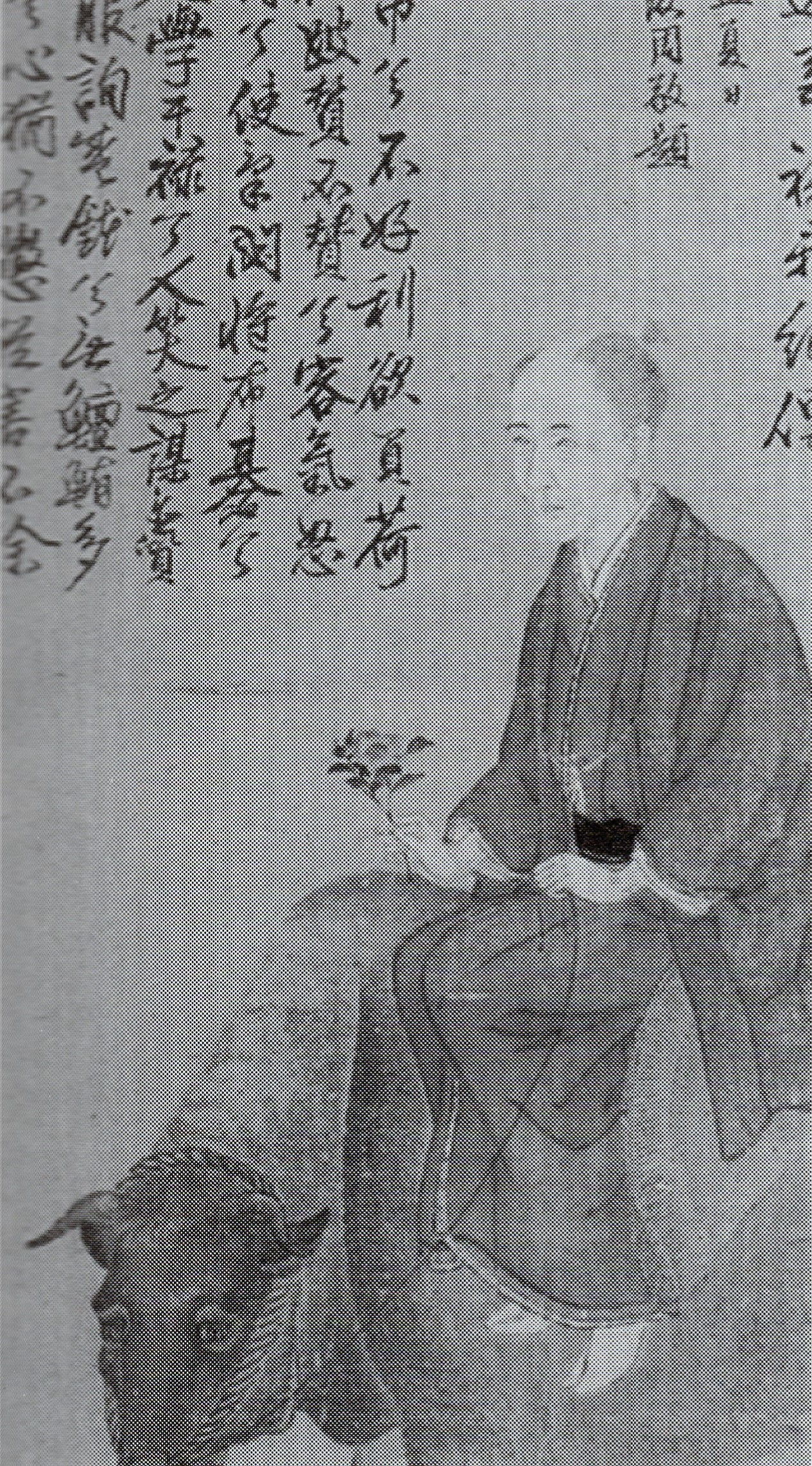 高場乱の肖像。